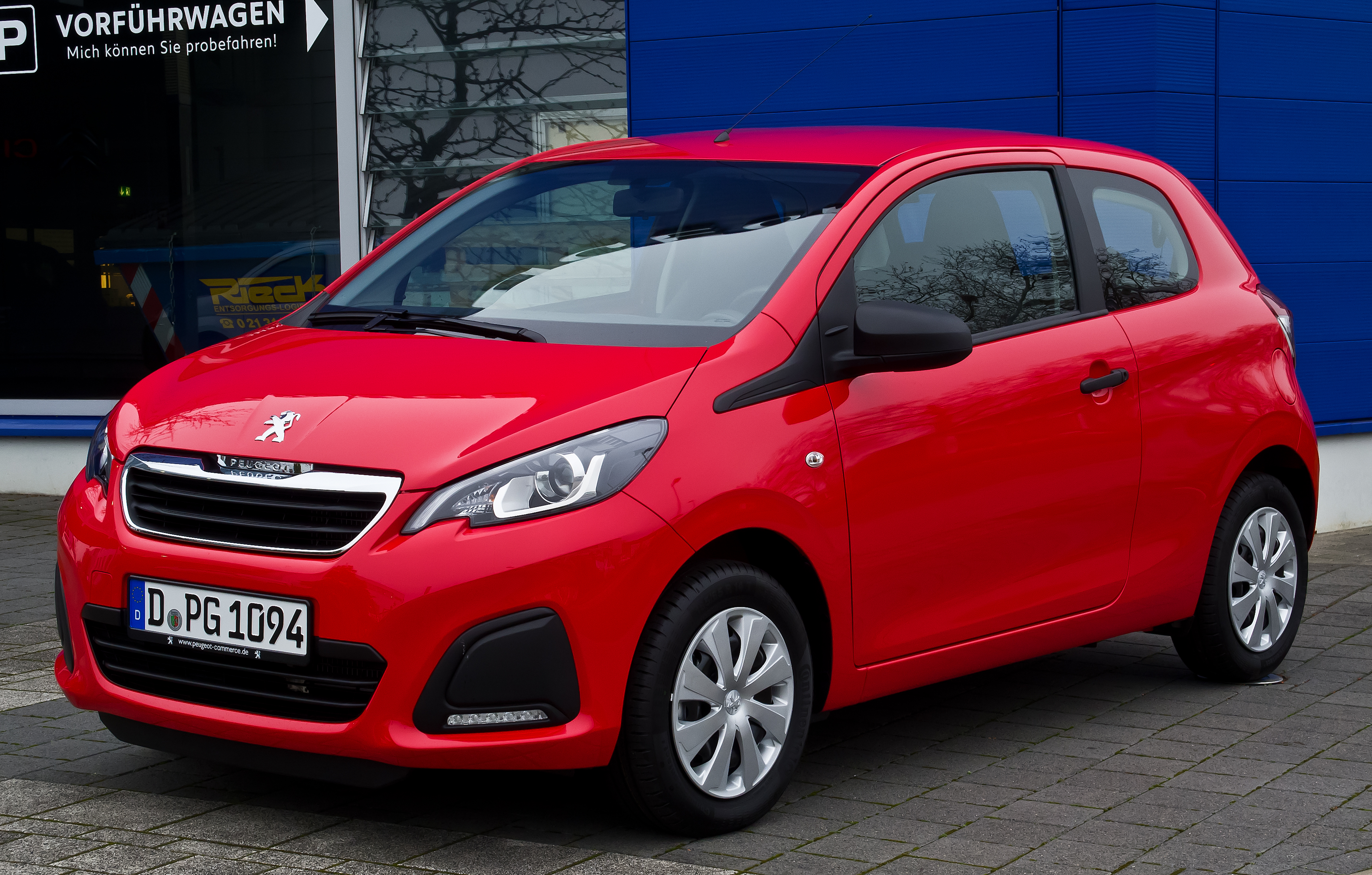 Peugeot 108 VTi 68 Acces